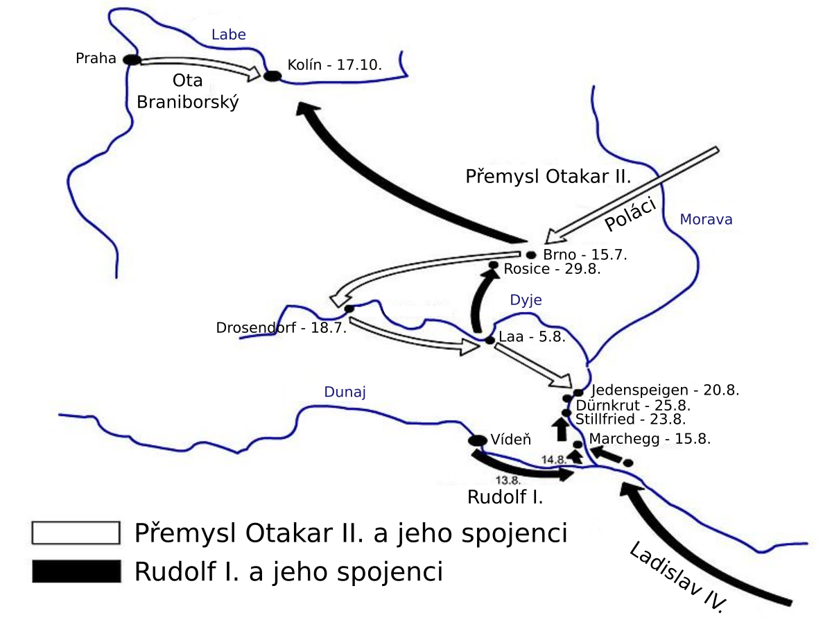 Tažení českého krále Přemysla II., římsko-německého krále Rudolfa I. a jejich spojenců z roku 1278.